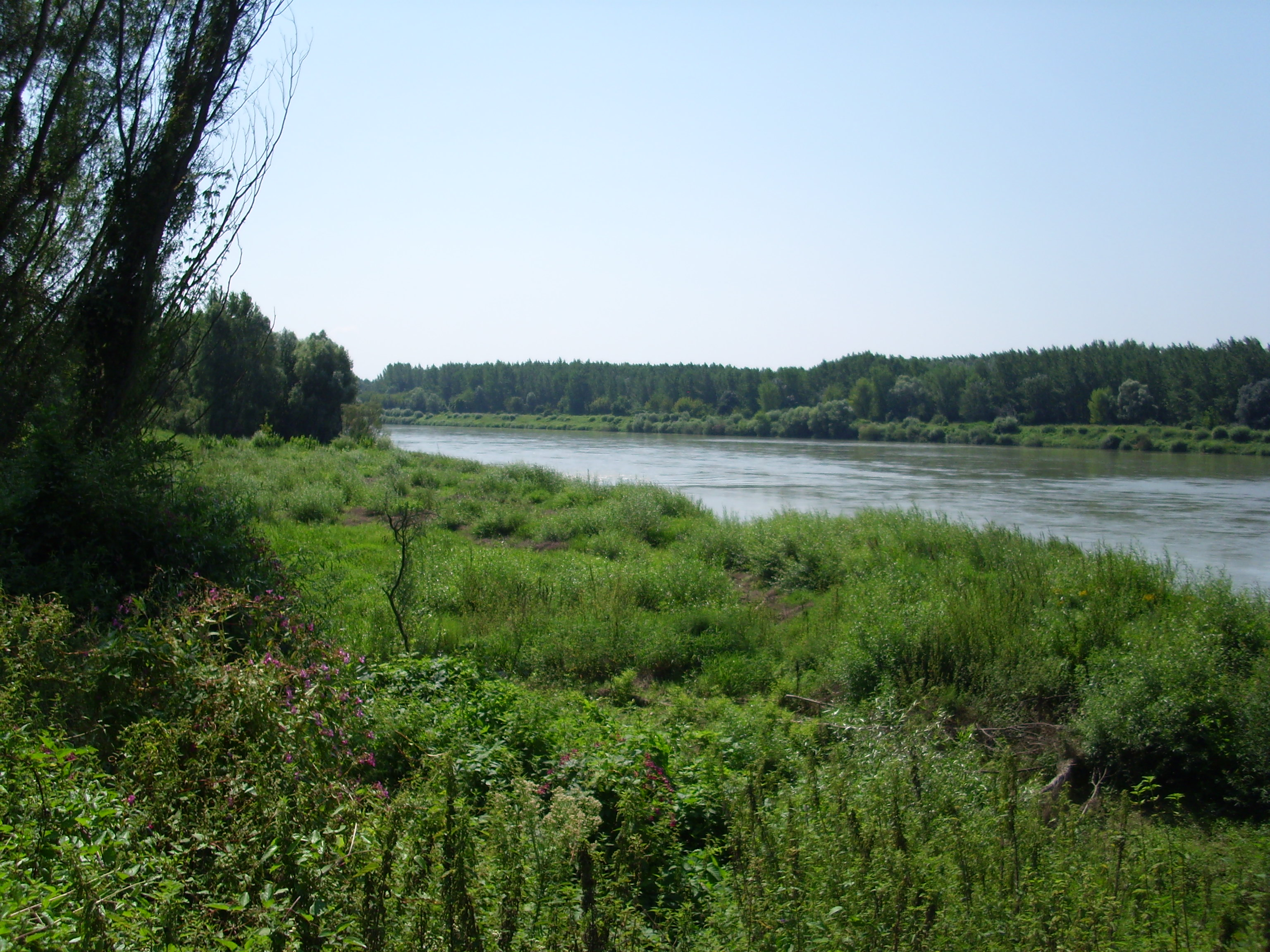 A Duna régi hajózott ága, még a vízlépcső megépítése előttről.